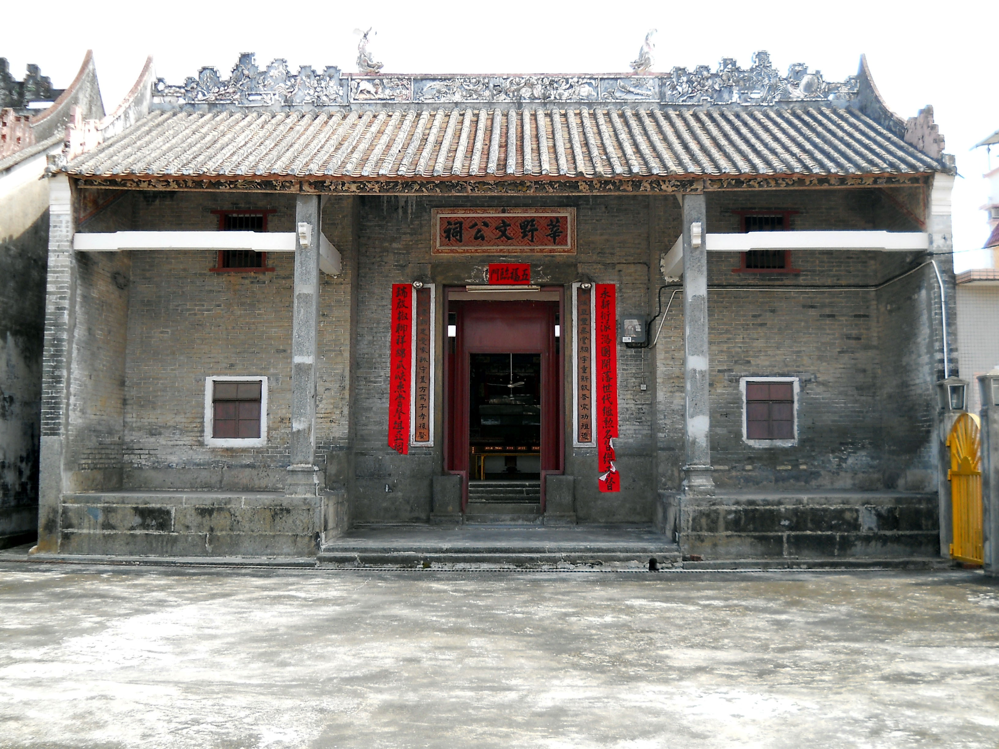 中文（香港）: 新田蕃田村莘野文公祠